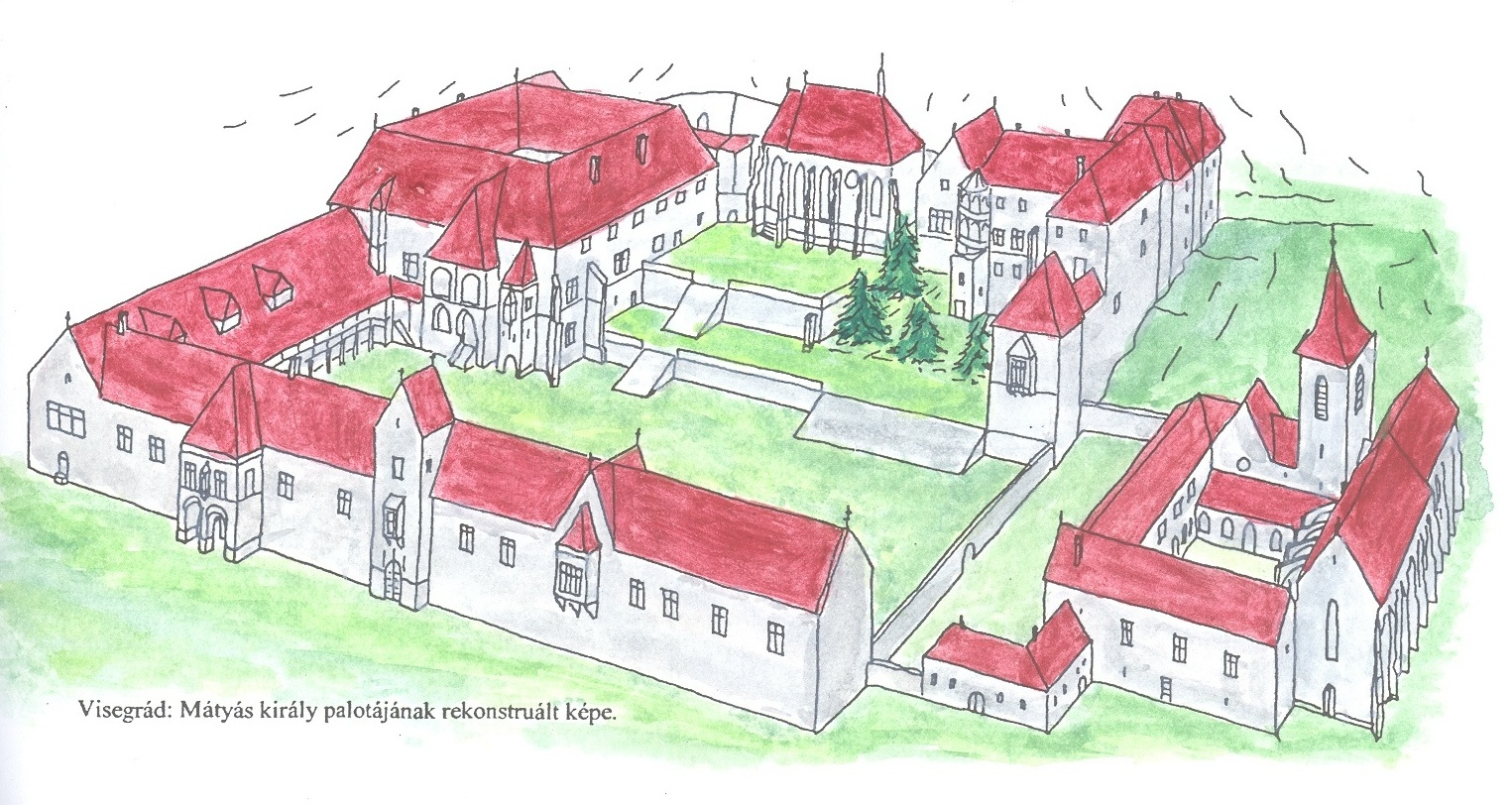 A visegrádi palota Mátyás király korabeli rekonstruált képe